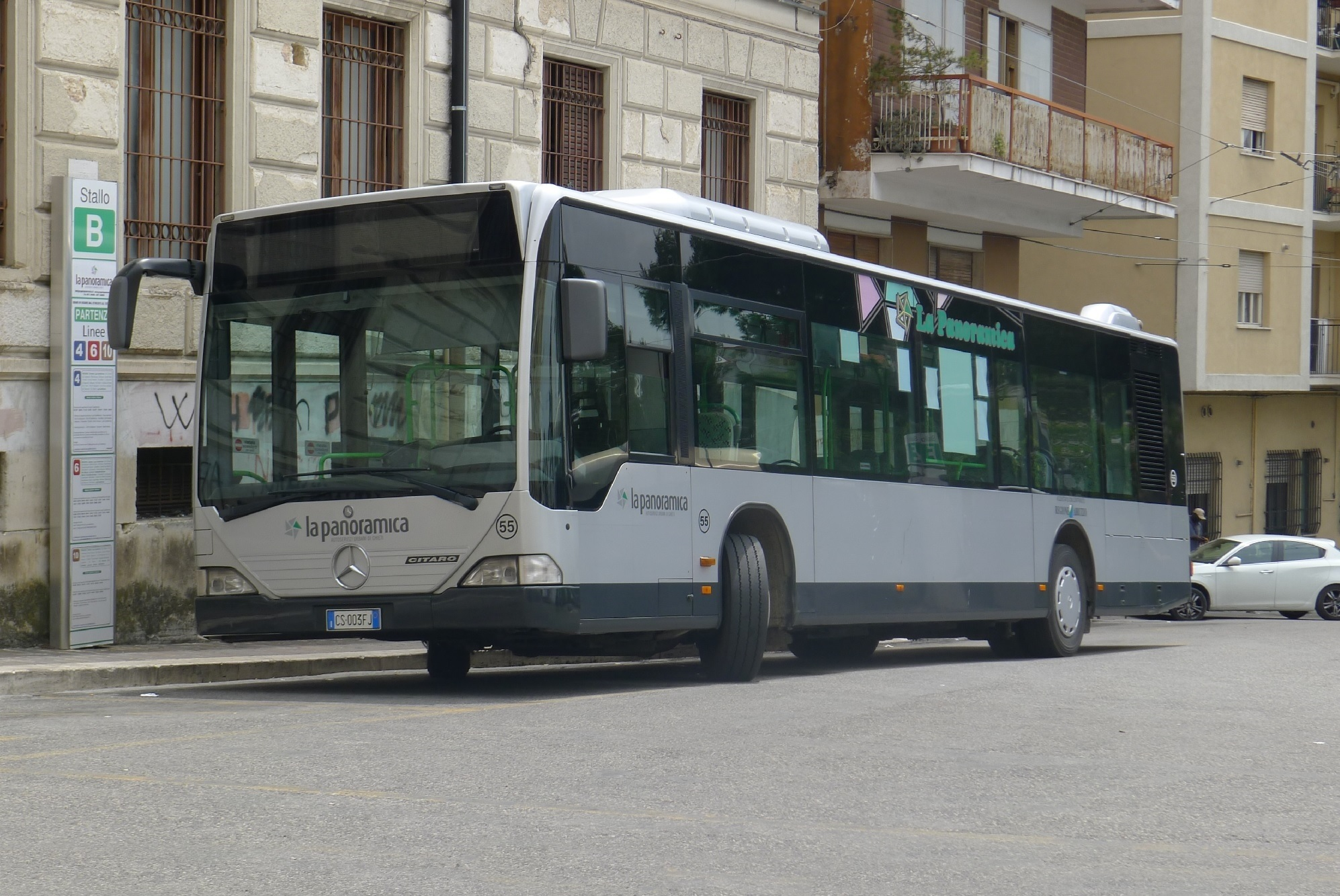 citaro chieti